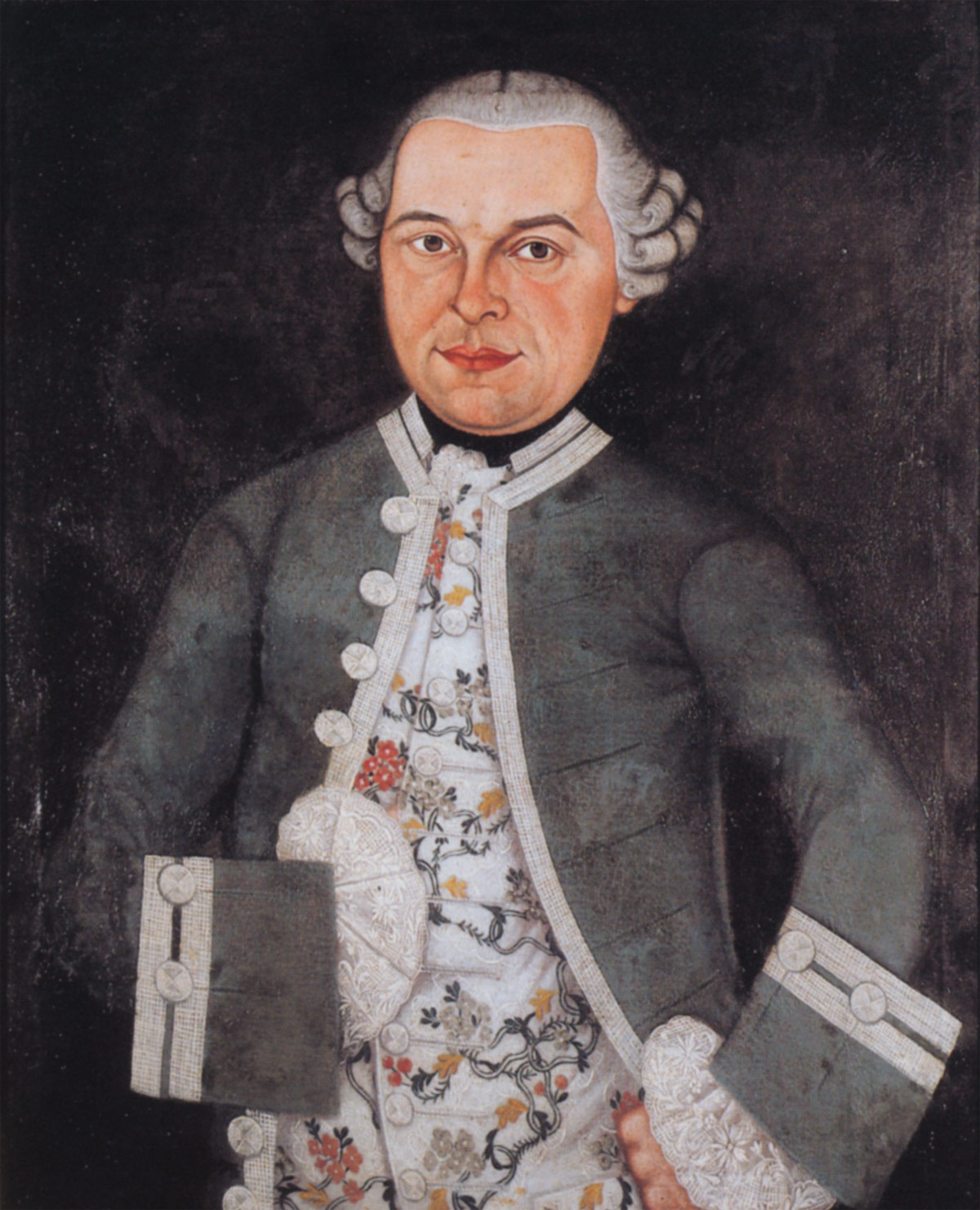 Heinrich Friedrich Hölderlin (1736–1772), Gemälde von 1767 im Deutschen Literaturarchiv Marbach